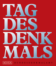 Vom Bundesdenkmalamt für die Kooperation 2011- mit Wikipedia zur Verfügung gestellt.